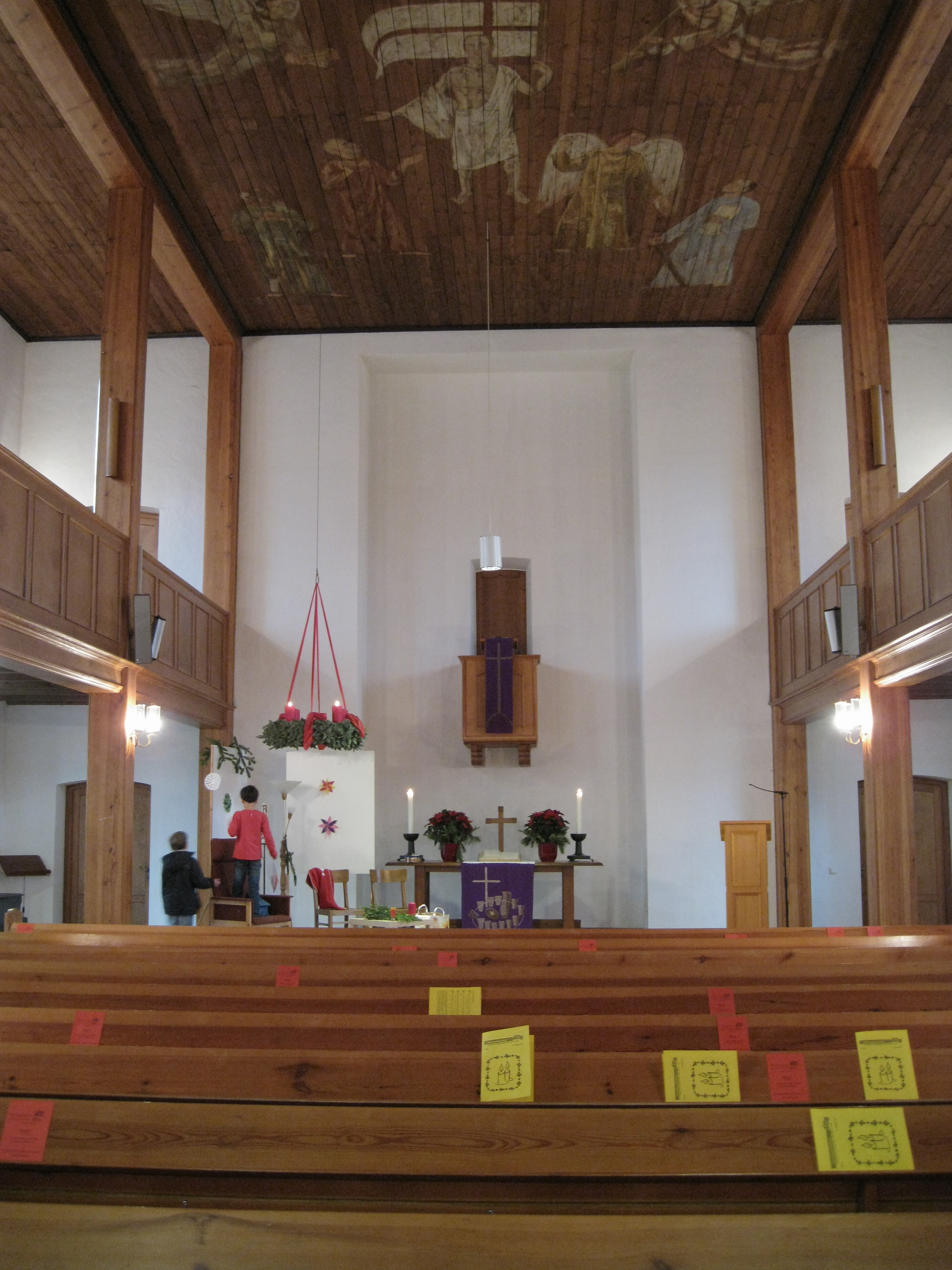 Blick in Richtung Altar